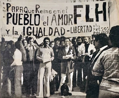 El Frente de Liberación Homosexual en Plaza de Mayo durante la asunción de Cámpora.